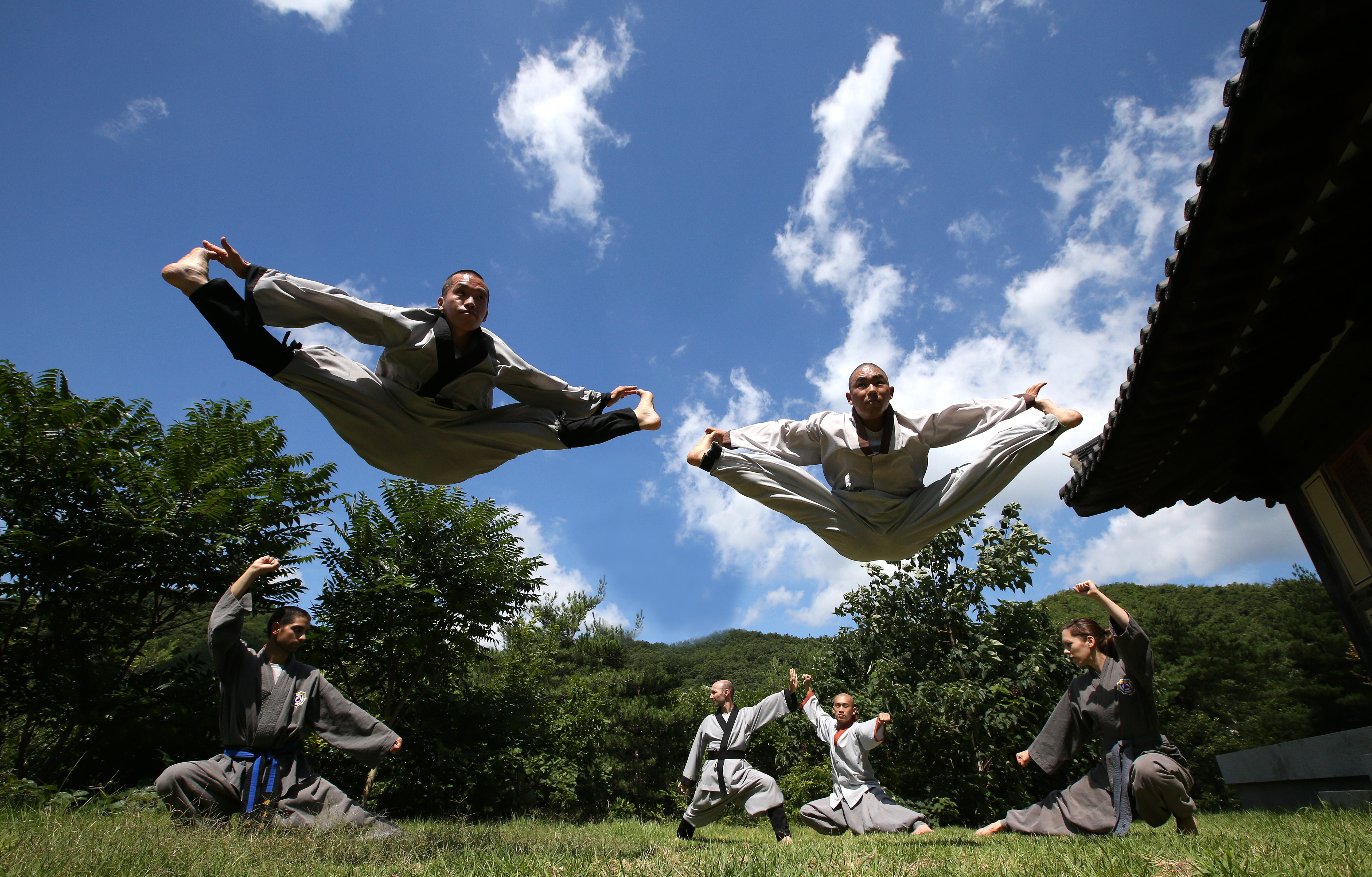 선무도 시연 동작 sunmudo motion